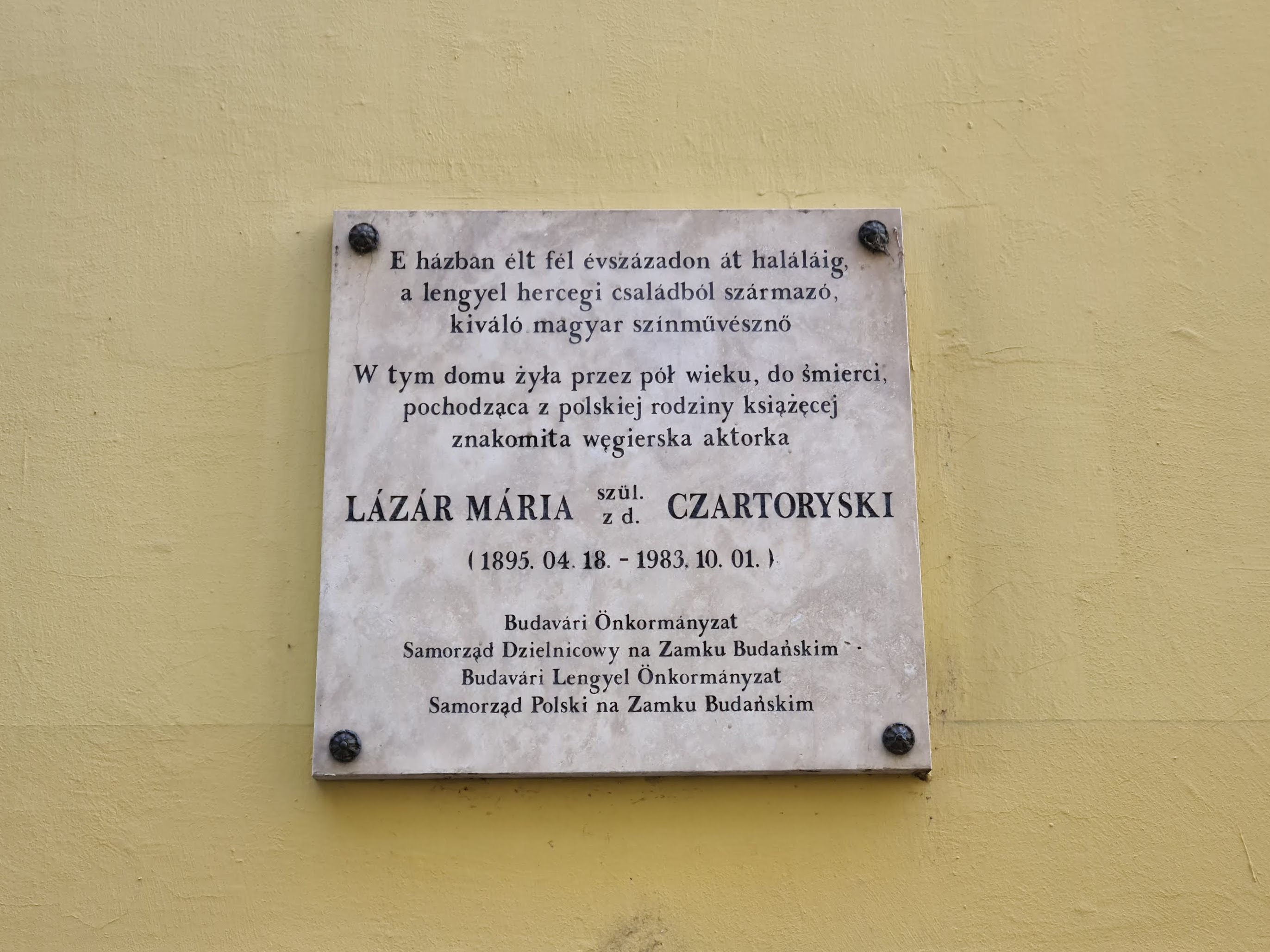 Lázár Mária színésznő emléktáblája a budavári Móra Ferenc utcában